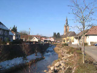 Village d'Anjoutey (90) rivière ('La Madeleine') et église